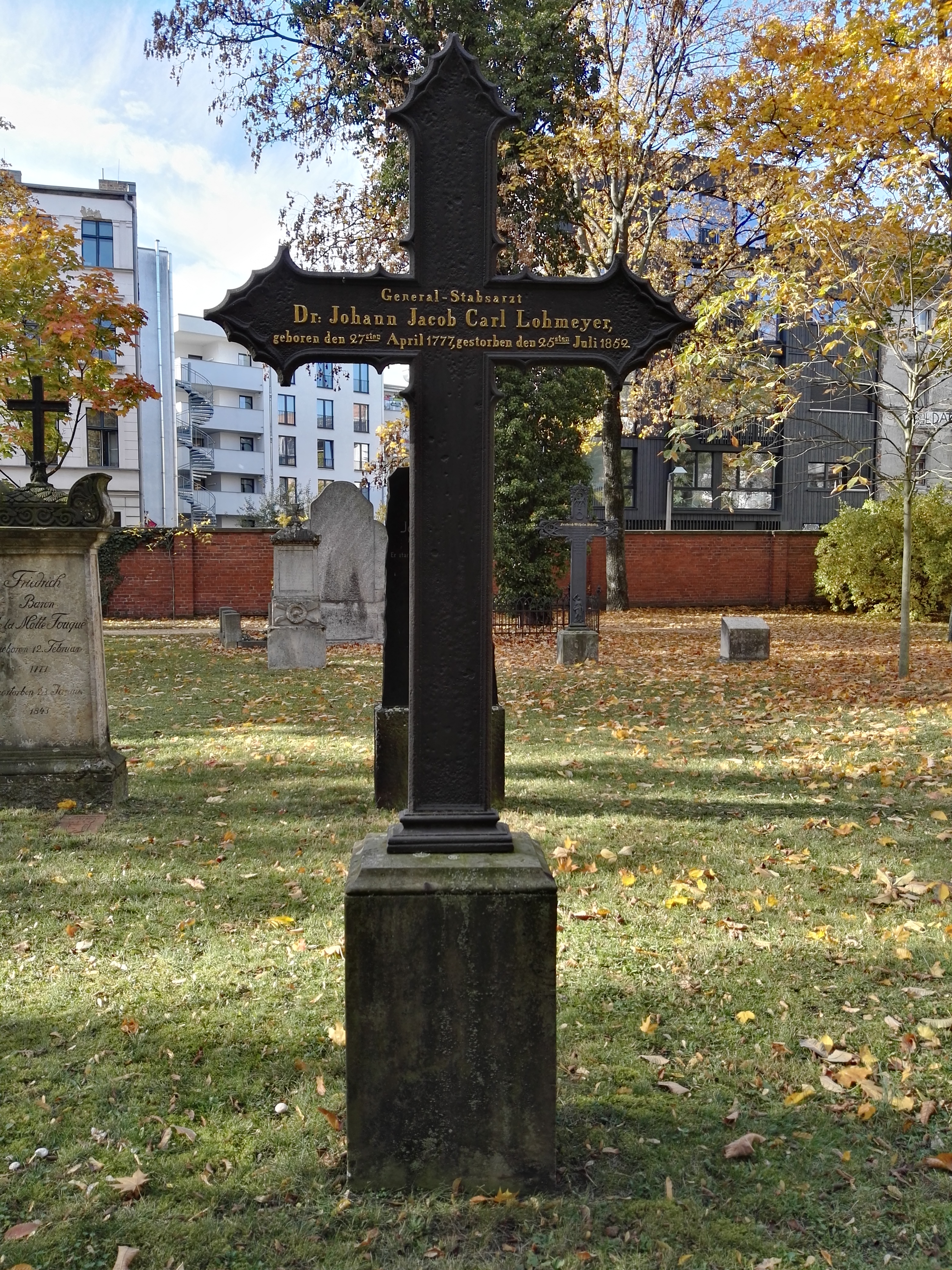 Grab von Johann Karl Jacob Lohmeyer auf dem Alten Garnisonfriedhof in Berlin-Mitte